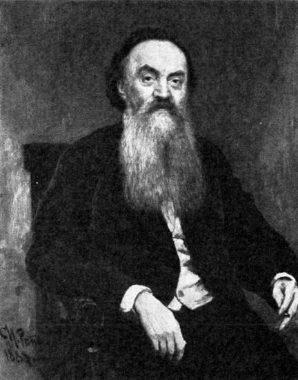 Русский философ Николай Николаевич Страхов (1828-1896)